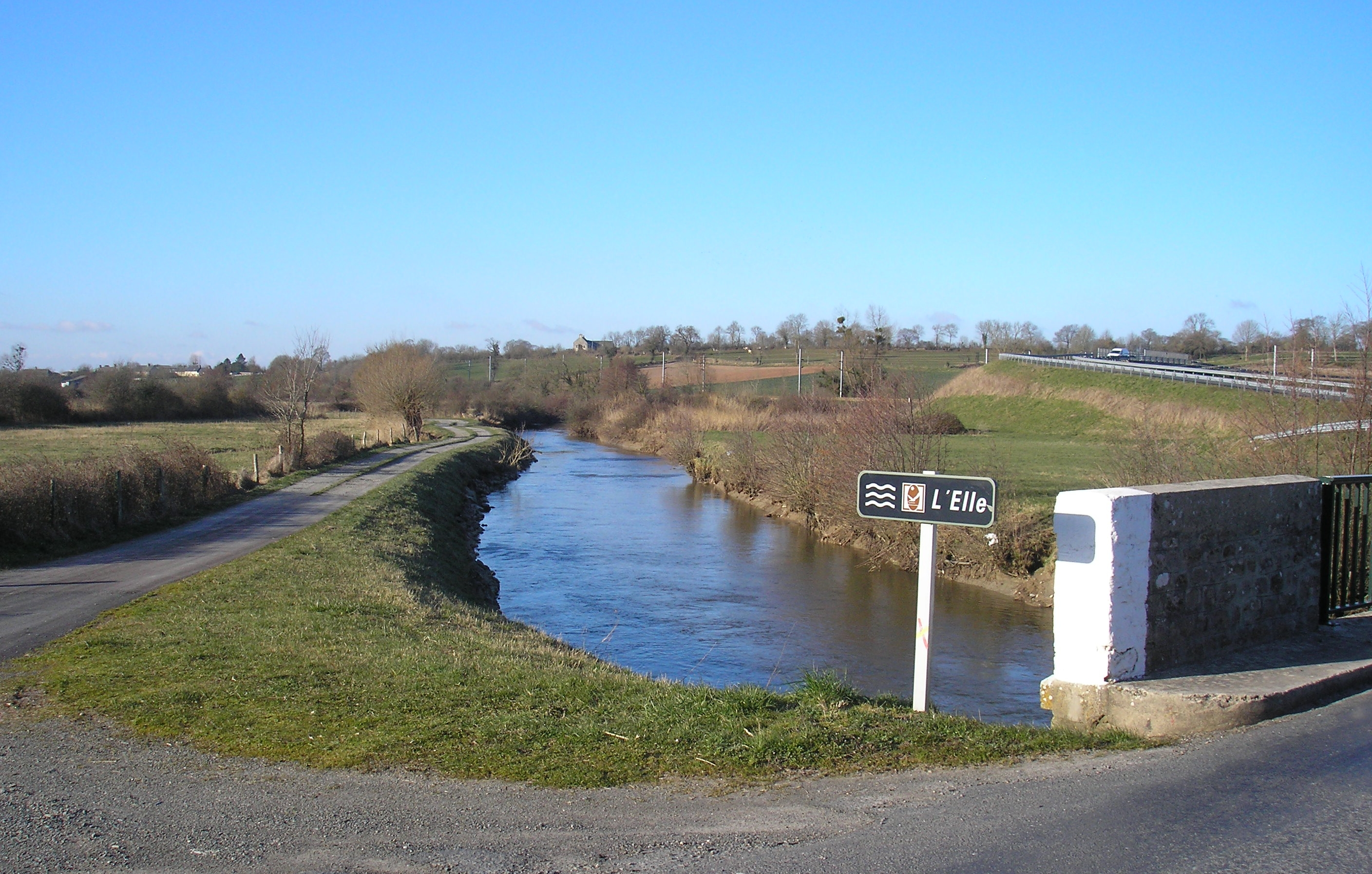 Neuilly-la-Forêt (Normandie, France). L'Elle.